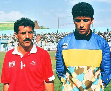 احد شیخ لاری -علی رضا نیک مهر بازی تراکتور سازی & پریسپولیس ( استادیوم باغشمال تبریز)